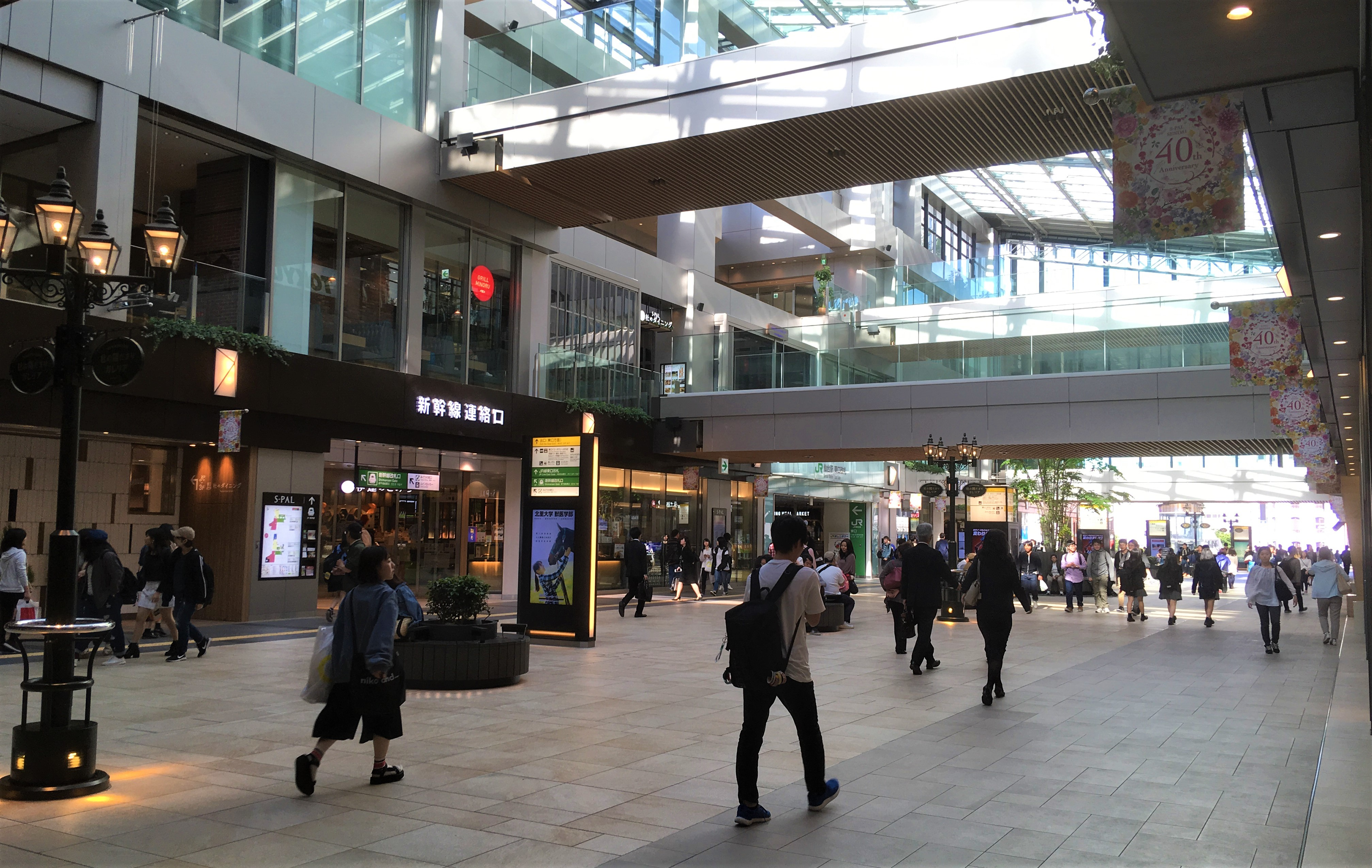 仙台駅東西自由通路（2018年5月）